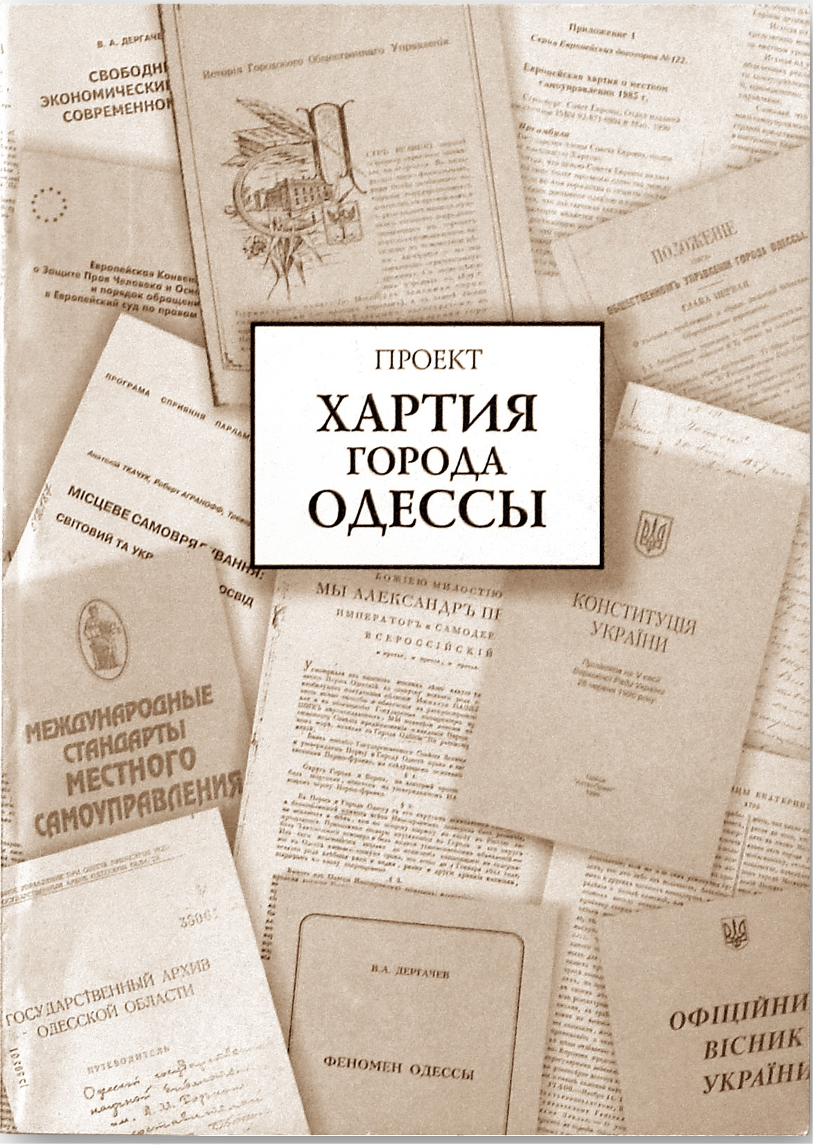 хартия